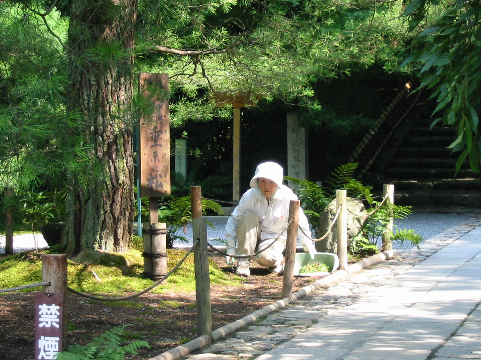 Ryoan-ji, onderhoud van de tuin door Japanse vrouw, eigen foto, ter beschikking gesteld onder GFDL